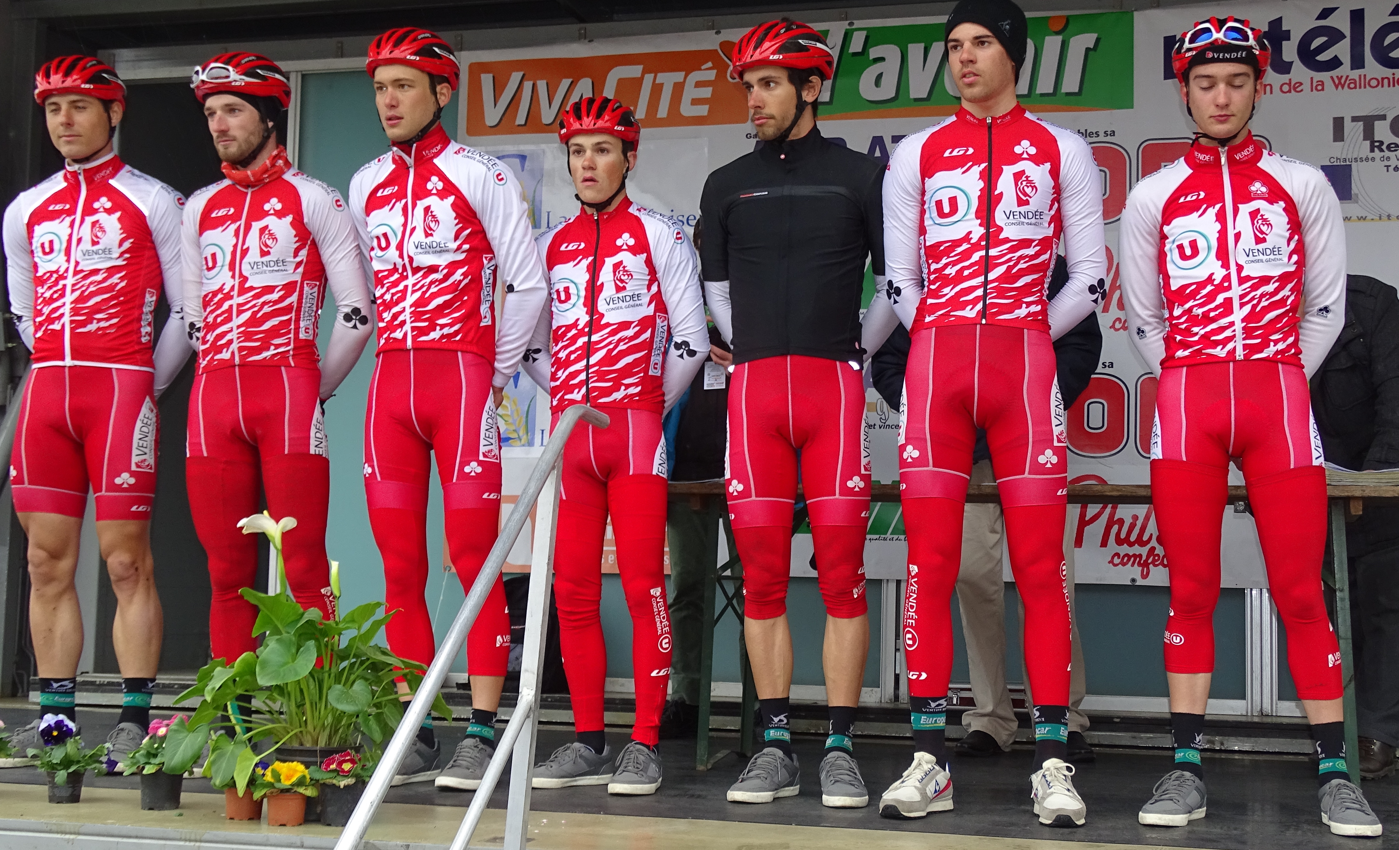 Triptyque des Monts et Châteaux 2015 Depicted people: Romain Cardis, Jérémy Cornu, Taruia Krainer, Loïc Bouchereau, Romain Guyot, Lilian Calmejane and Marlon Gaillard Depicted team: Vendée U